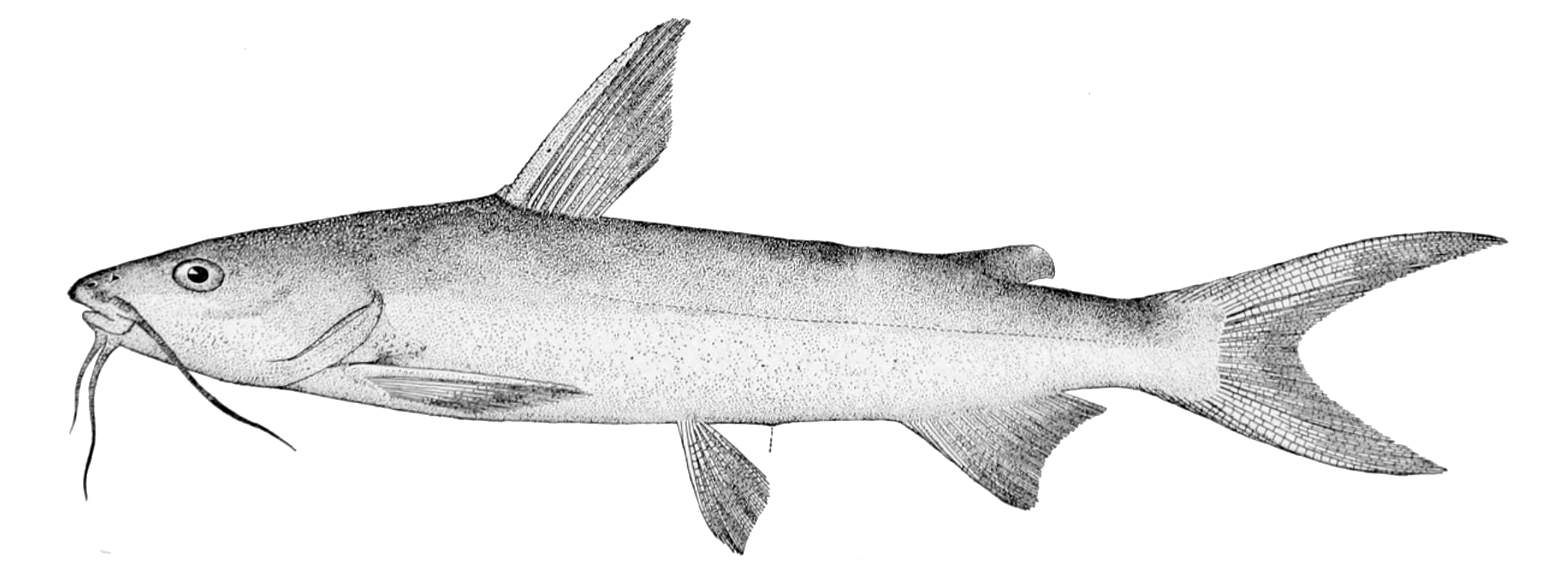 Ariopsis felis syn. Arius felis